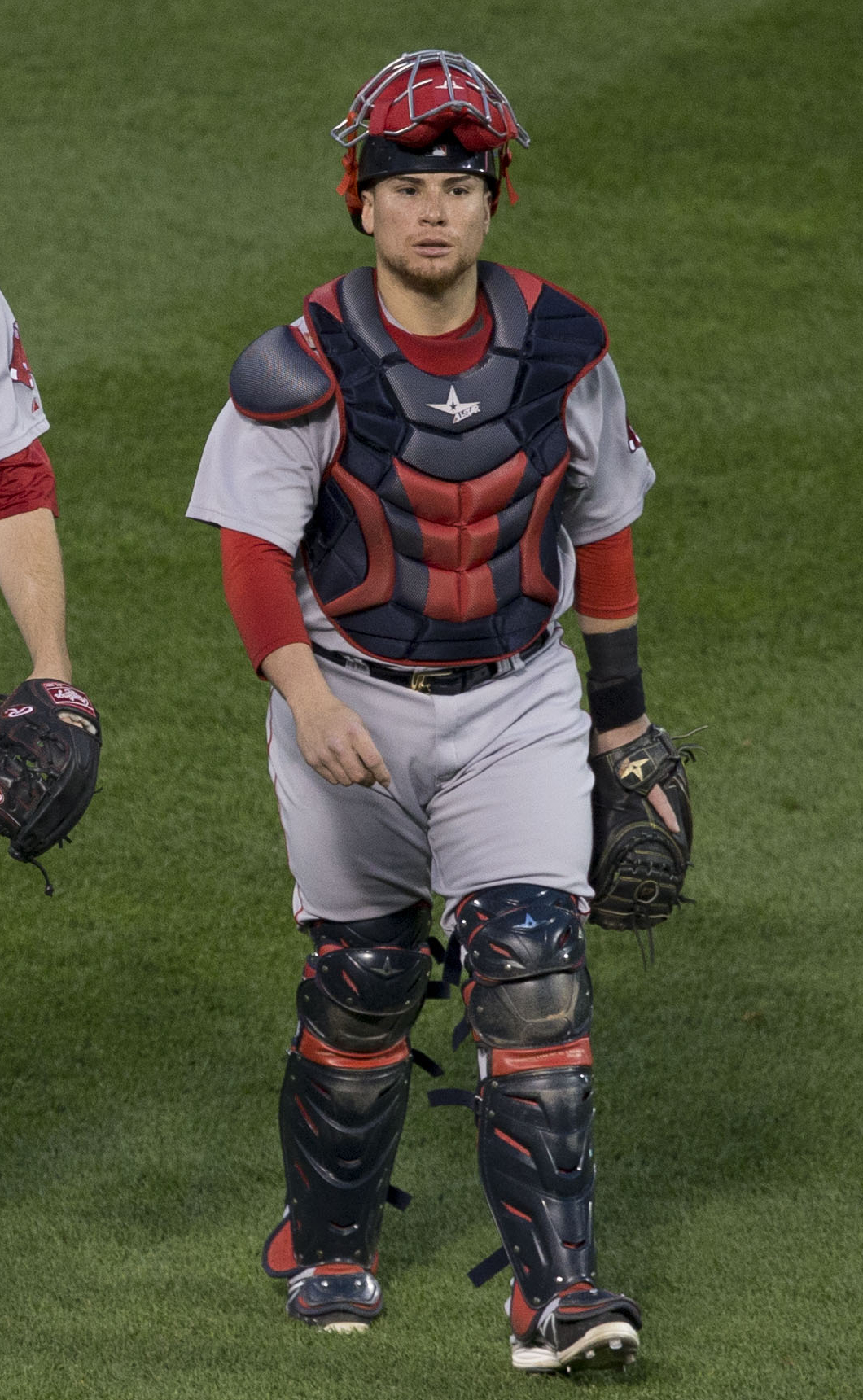 Christian Vázquez